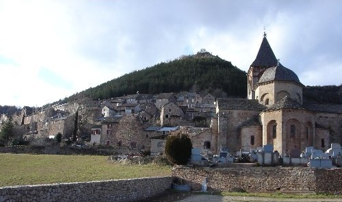 Le village de Montjaux (Aveyron)